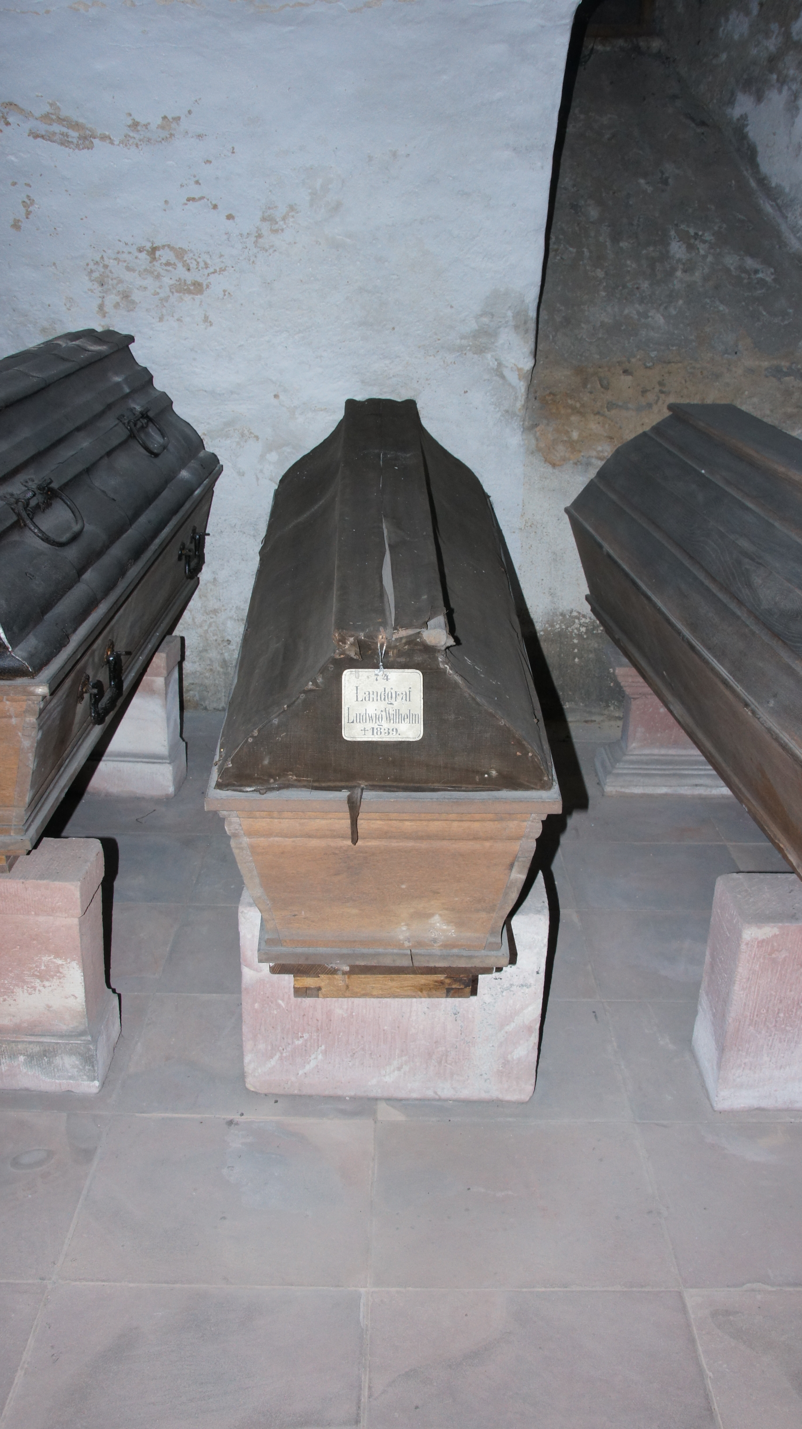 Bad Homburg vor der Höhe, Schloss, Gruft, Landgraf Ludwig Wilhelm